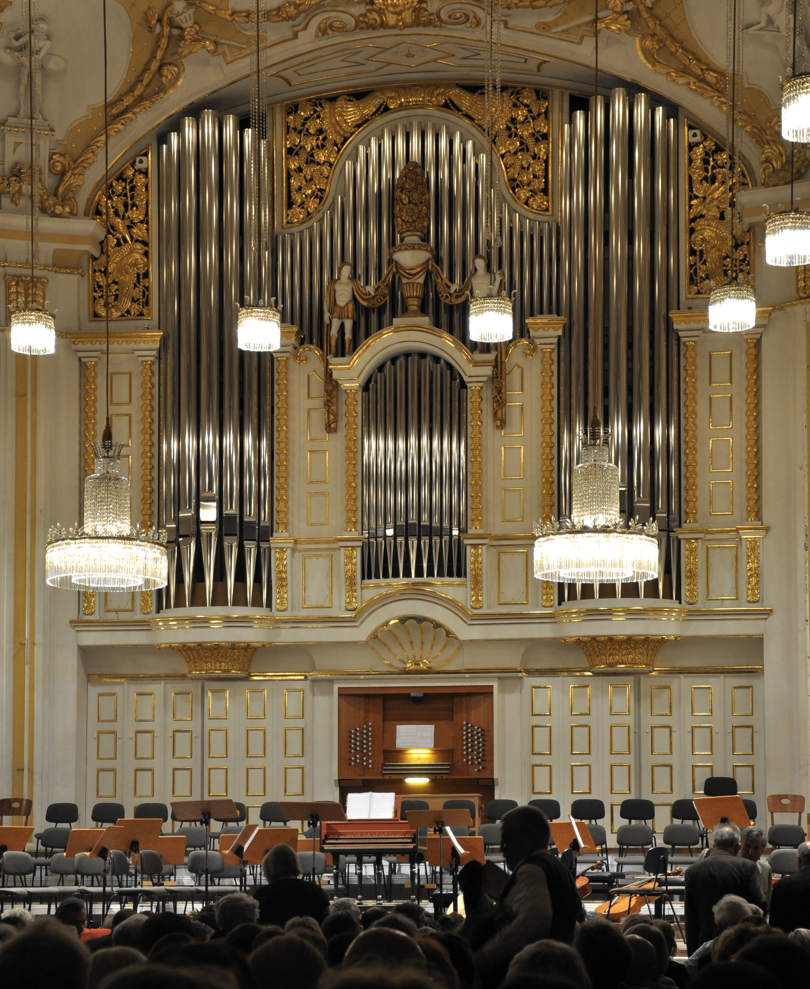 Salzburg, Mozarteum, Großer Saal, Orgel